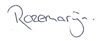 Rozemarijn, naam. De naam 'Rozemarijn' in handschrift, geschreven door een naamdraagster (nl. Rozemarijn vL). Voornaam, meisjesnaam, Nederlandse naam.